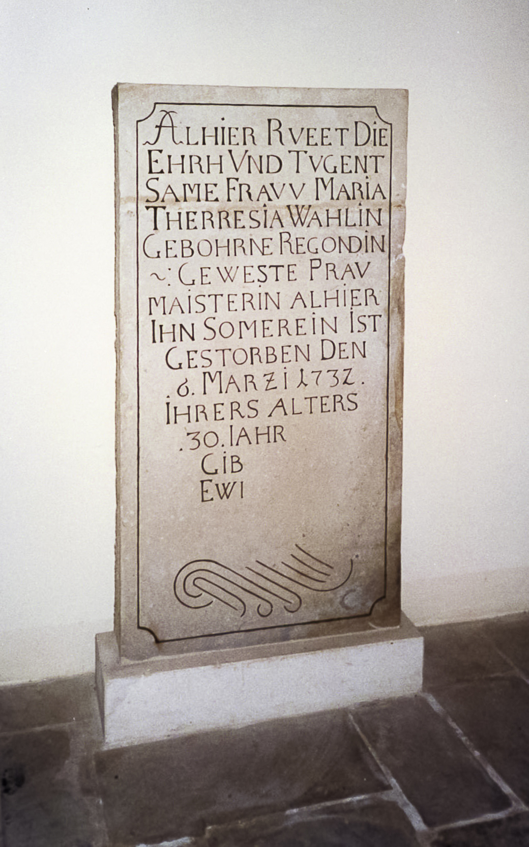 Sommereiner Kirche, Epitaph der Maria Theresia Wallin, geb. Regondin, 1732.